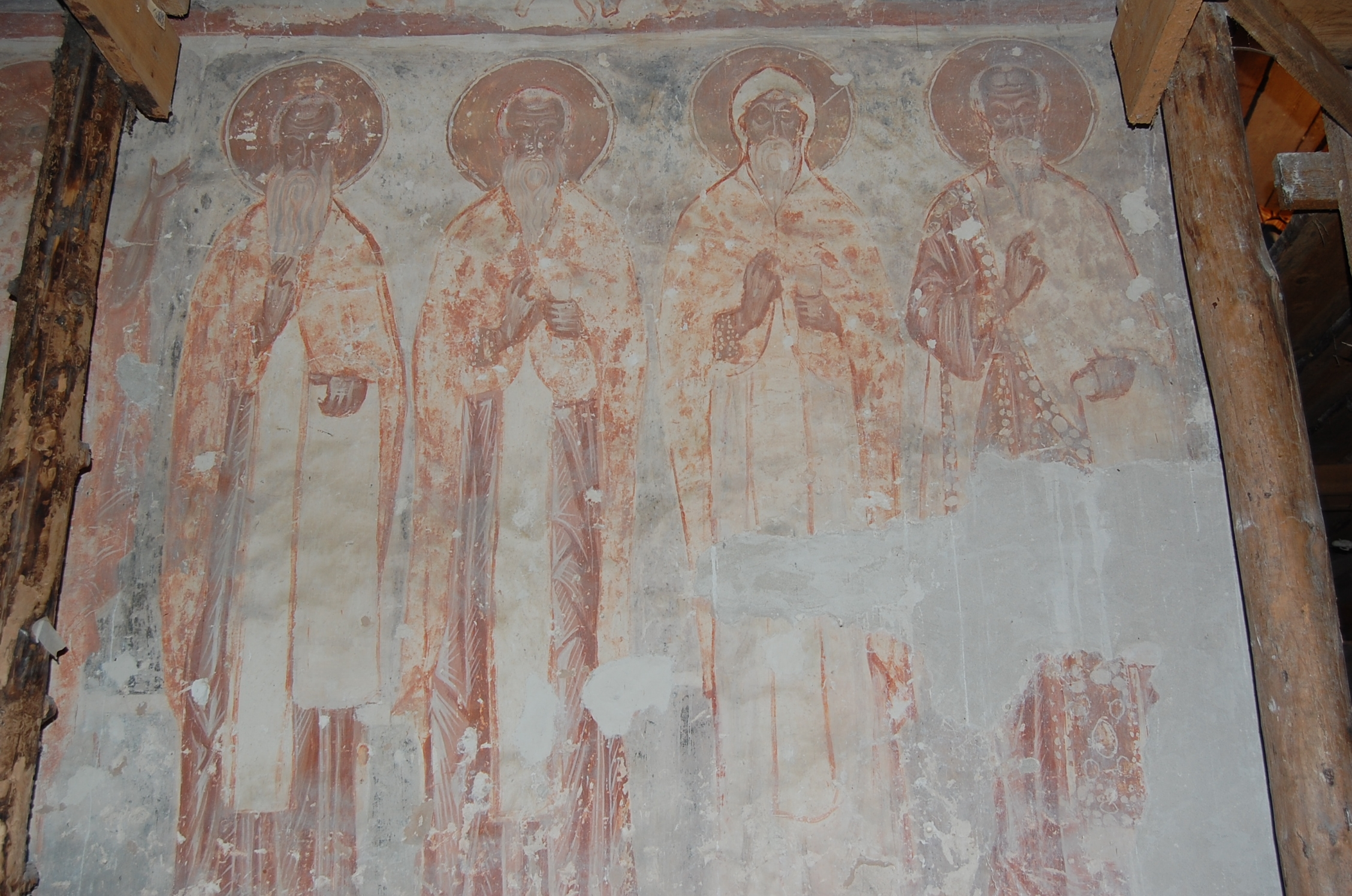 Фреска собора Снетогорского монастыря. 1313 год.